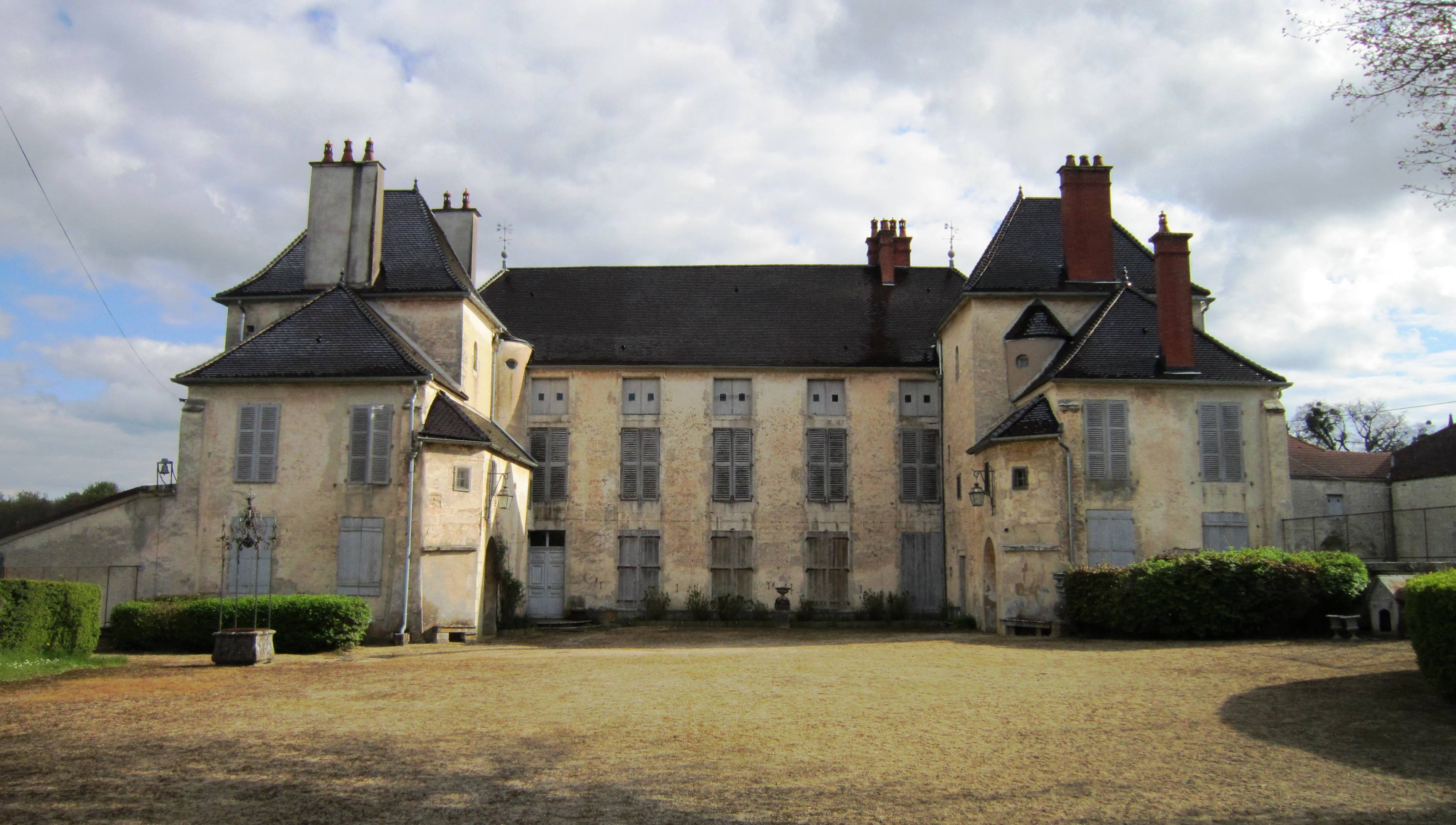 Château d'Ampilly-le-Sec (Côte-d'Or)